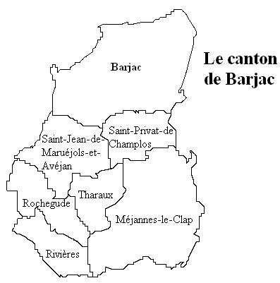 Le canton de Barjac Image personnelle